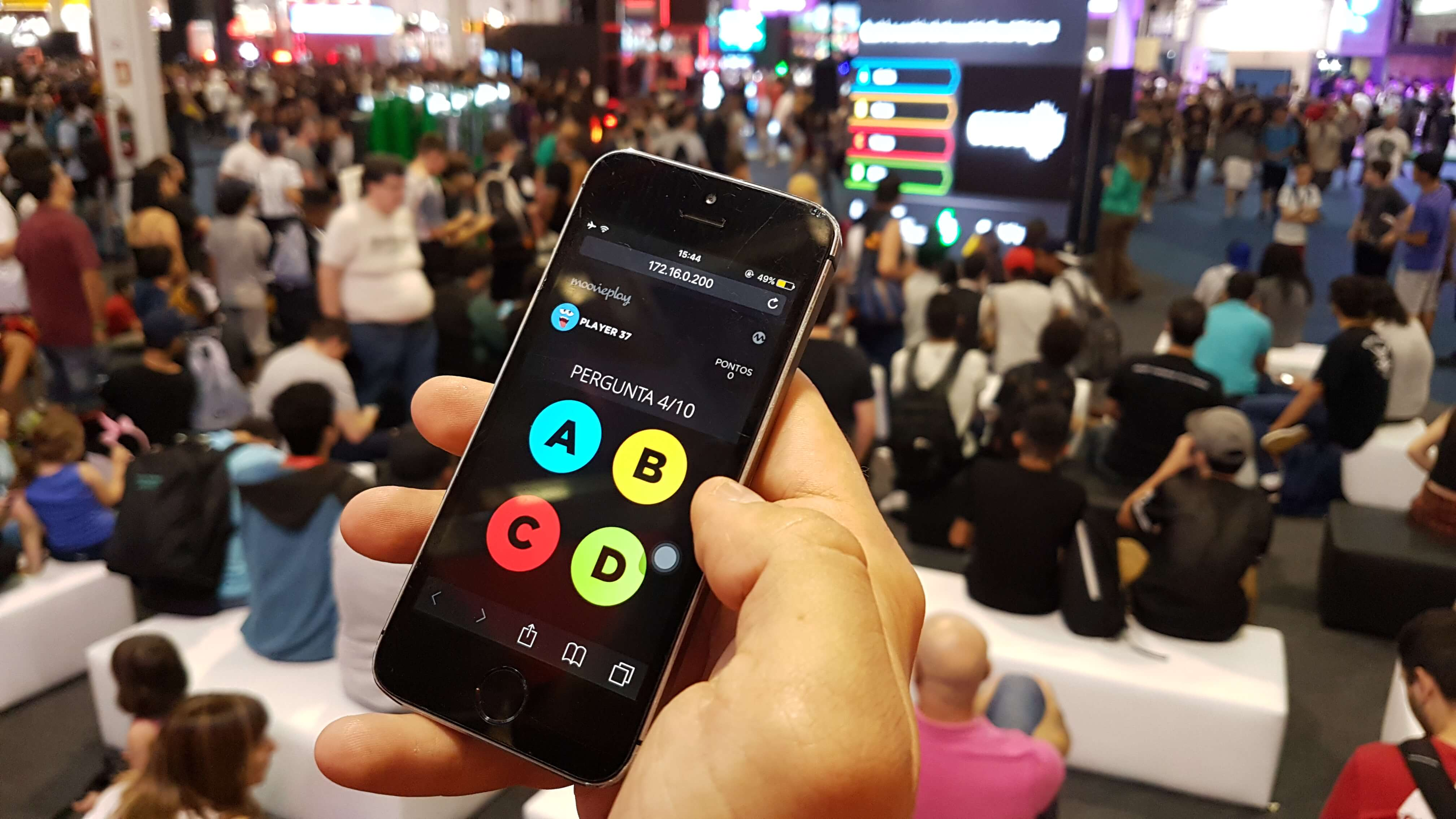 usuários jogando Quiz no evento da BGS